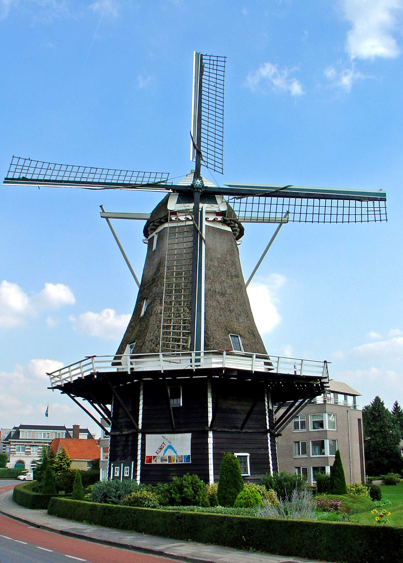 Molen 'de Konijnenbelt' te Ommen